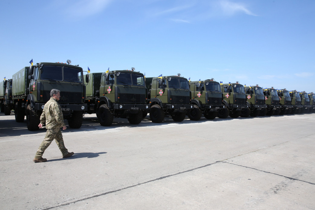 Президент передав озброєння та військову техніку особовому складу Збройних Сил України.